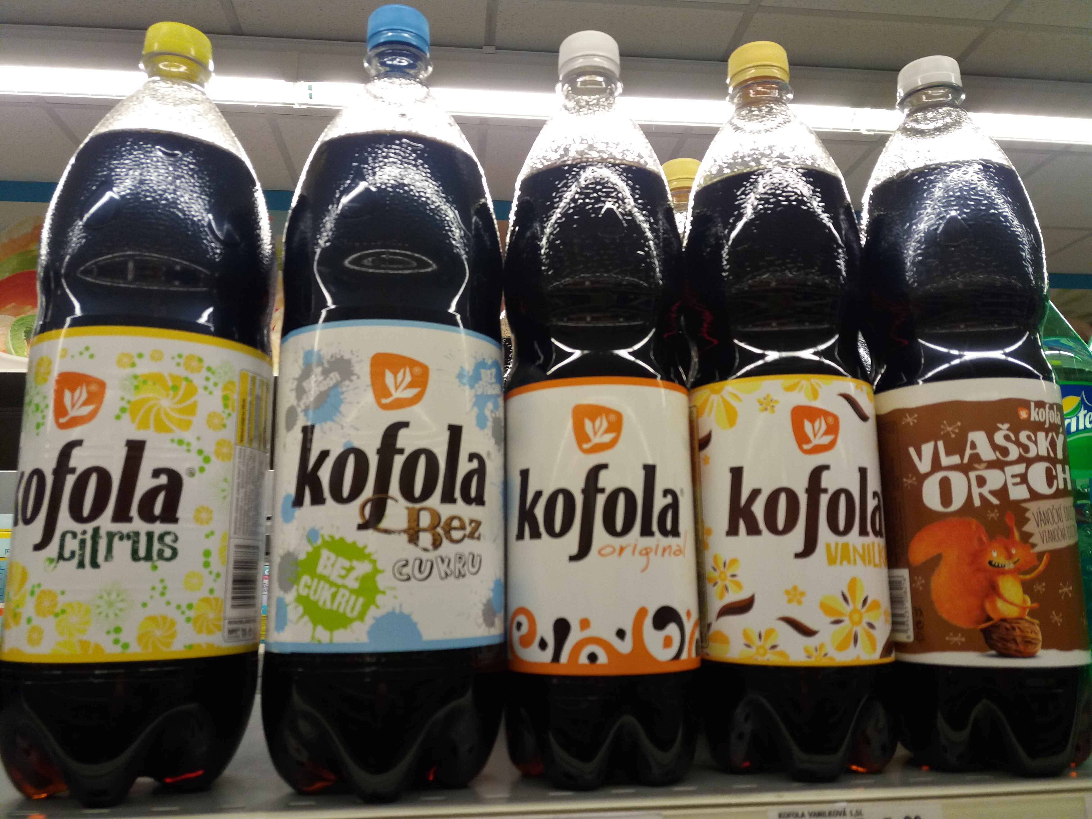 Kofola - citrus, bez cukru, original, vanilka, vlassky orech